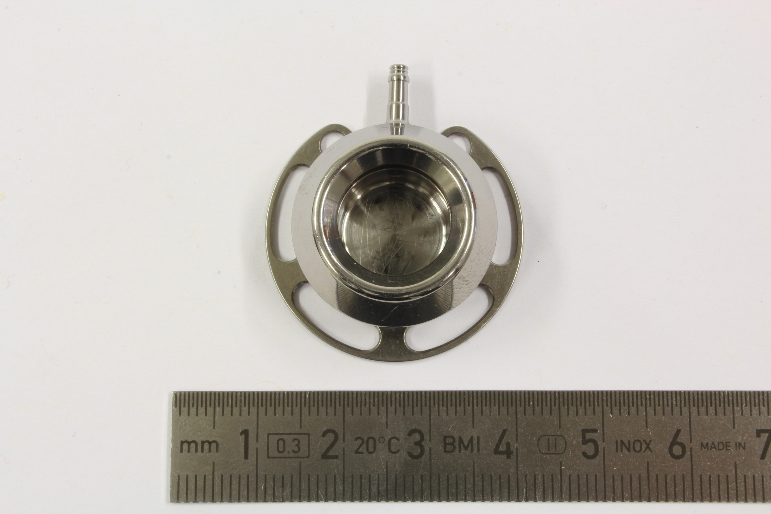 Port, Draufsicht